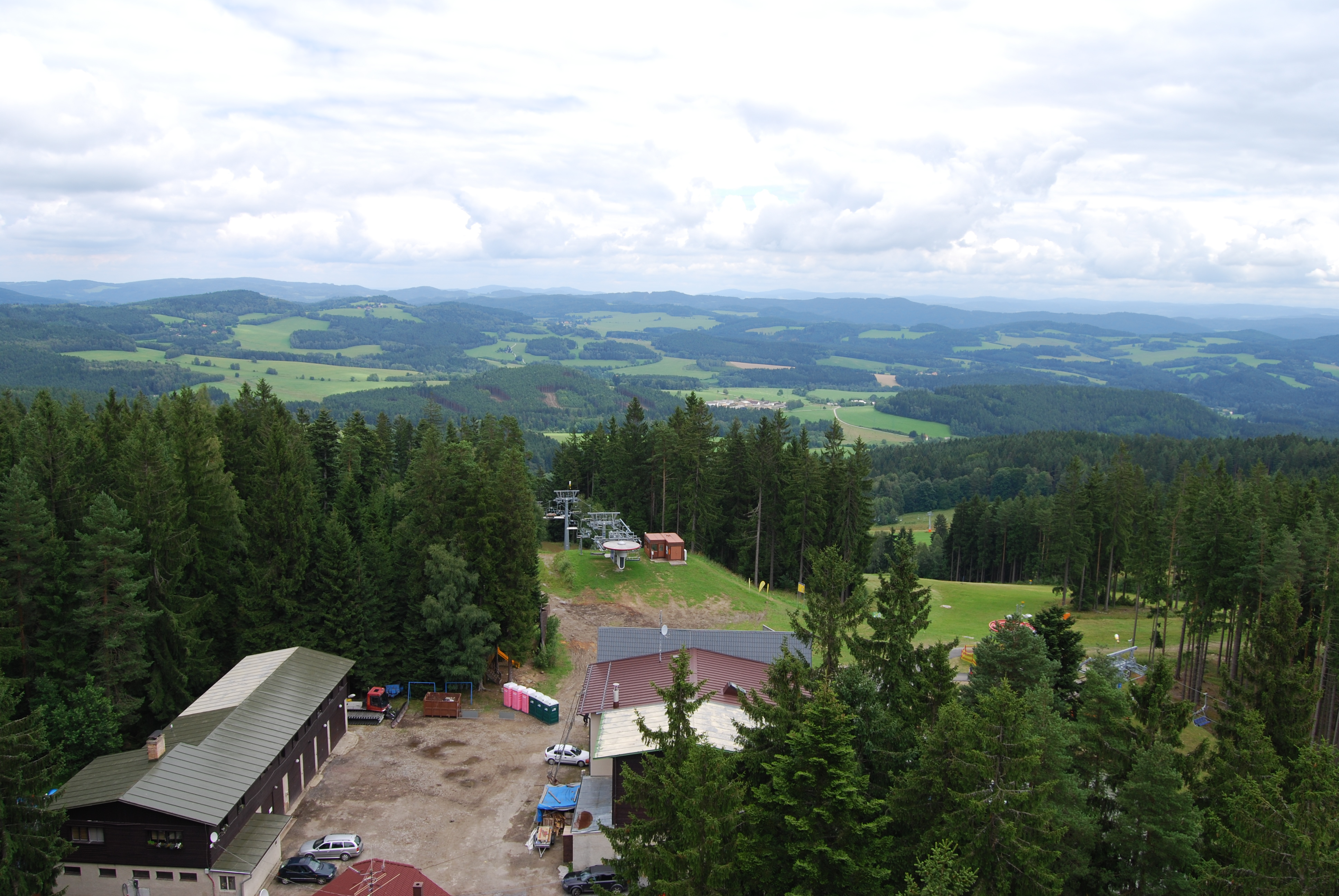 Pohled z vyhlídkové věže. Stezka korunami stromů. Lipno nad Vltavou. Okres Český Krumlov. Česká republika.